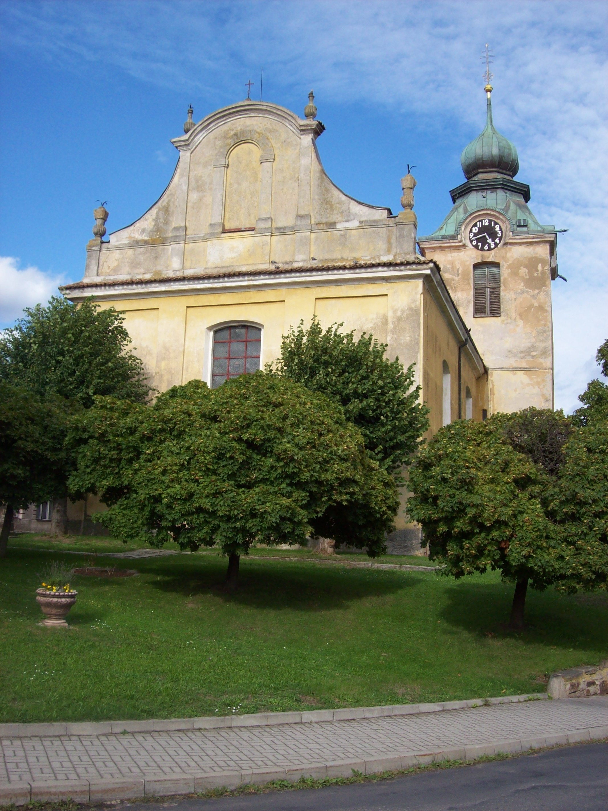 Cerhovice - kostel sv. Martina